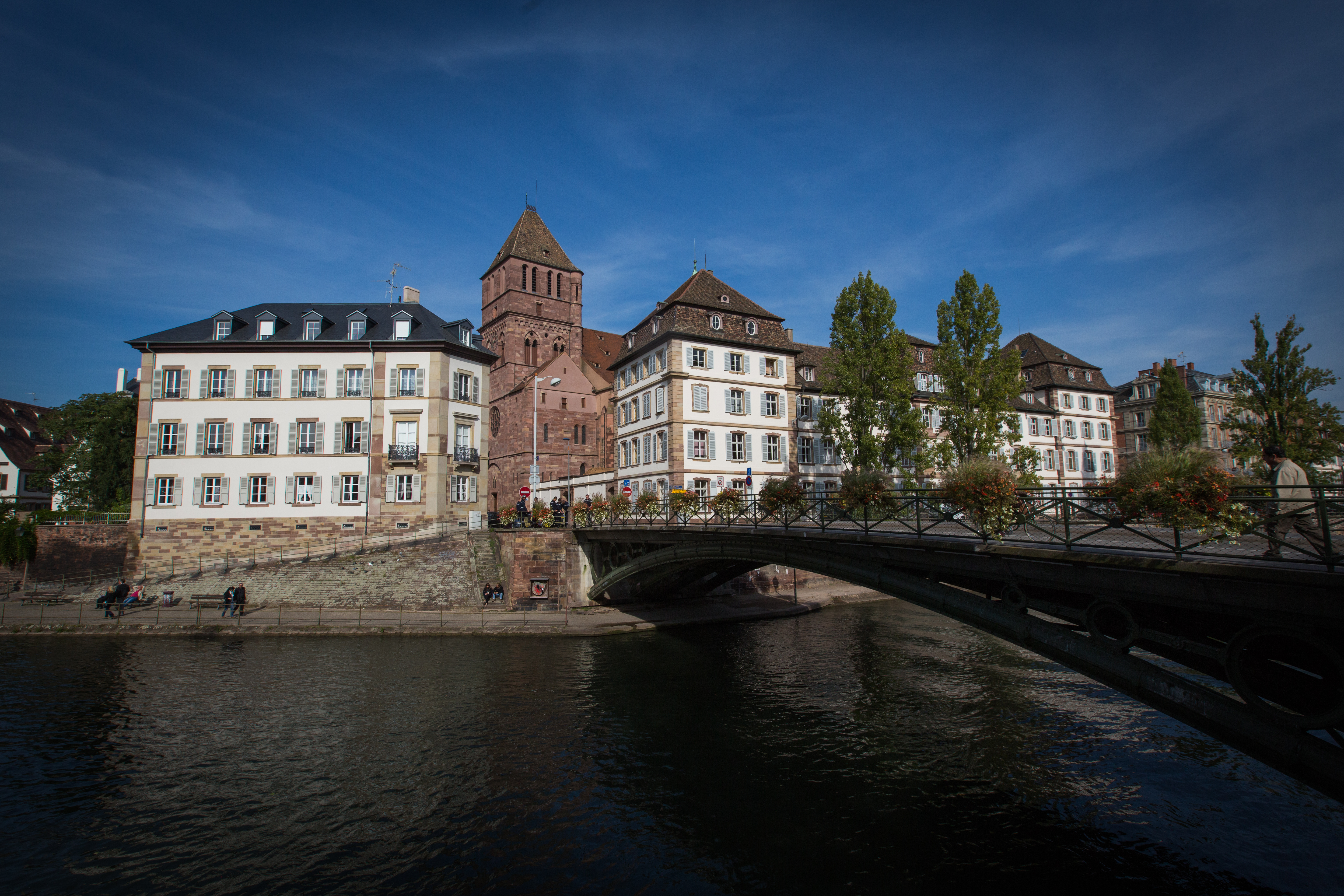 Strasbourg église Saint-Thomas et séminaire protestant octobre 2013